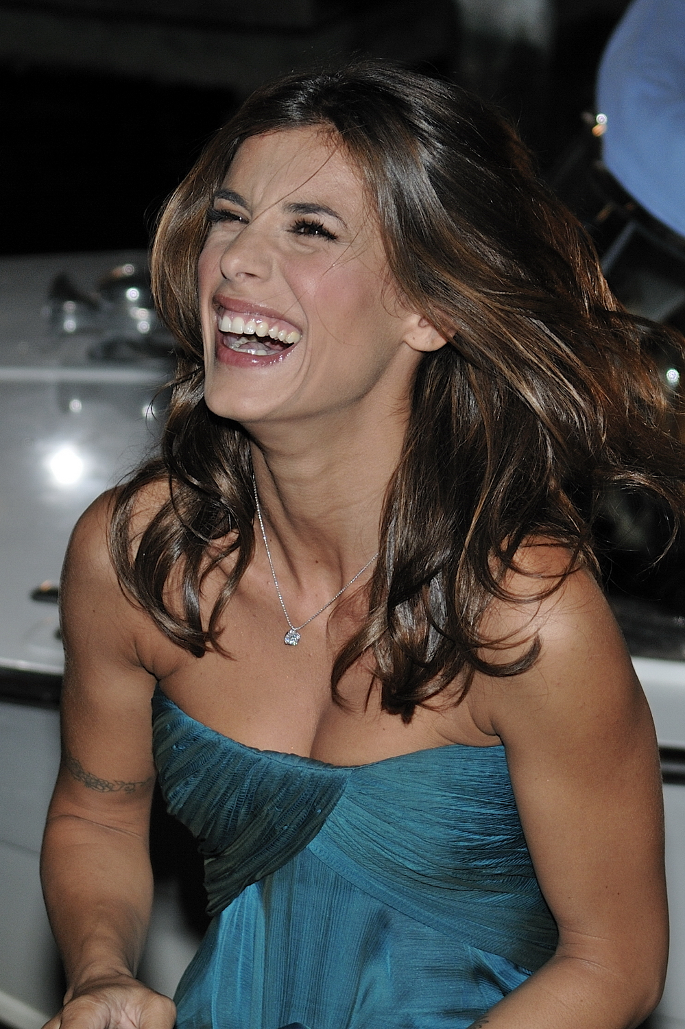 66ème Festival du Cinéma de Venise (Mostra), 6ème jour. George Clooney et Elisabetta Canalis, rentrant dans leur Hôtel de Venise après le tapis rouge du film : The men who stare at goats.